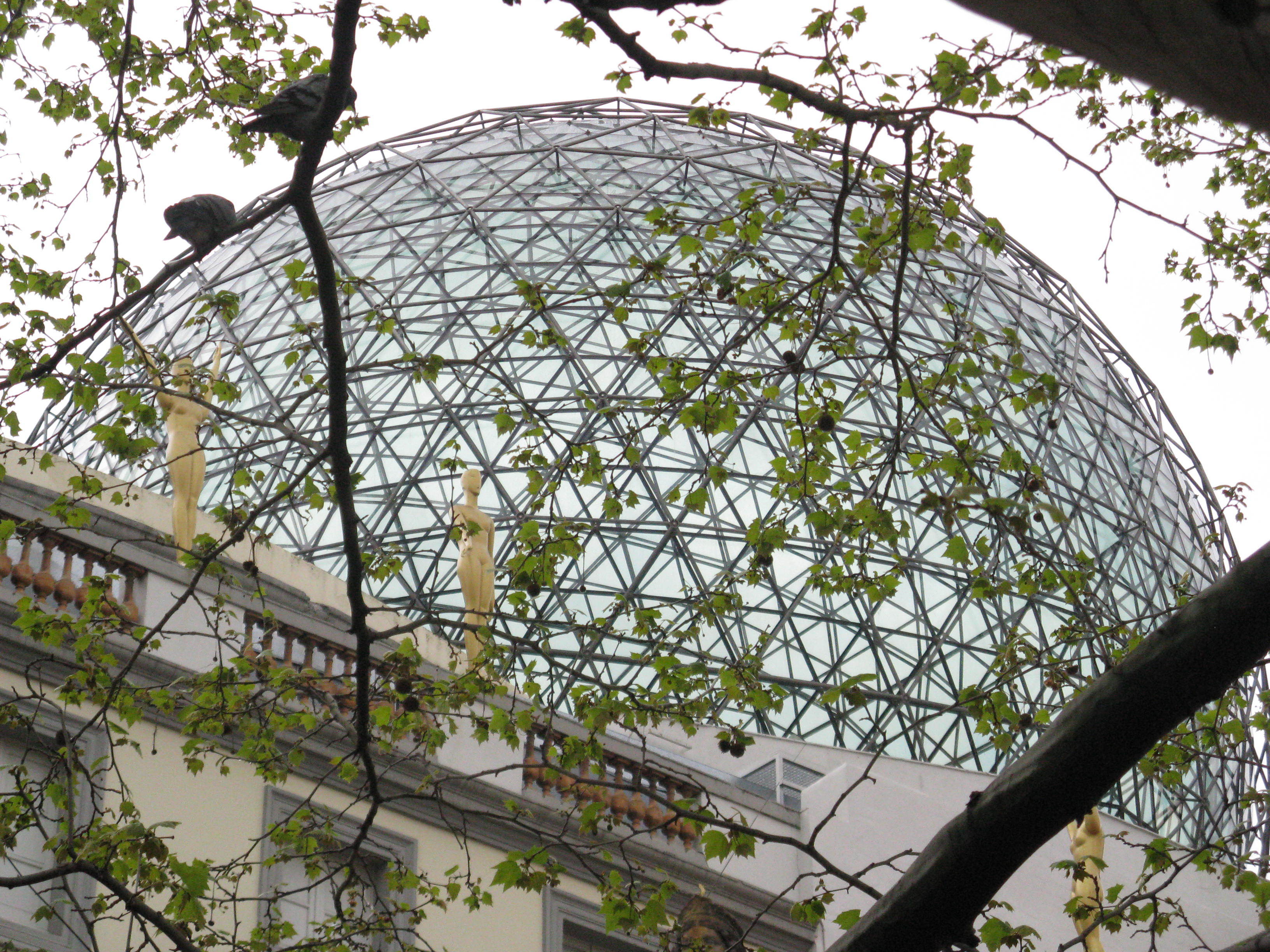 Dali-Museum in Figueres/Spanien: Glaskuppel